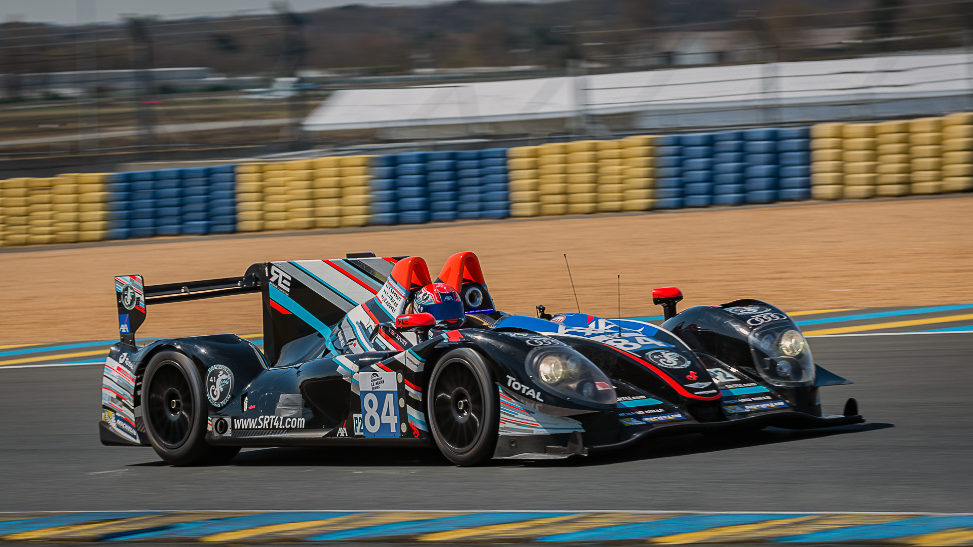 Frédéric Sausset lors d'une journée d'essais sur le circuit du Mans